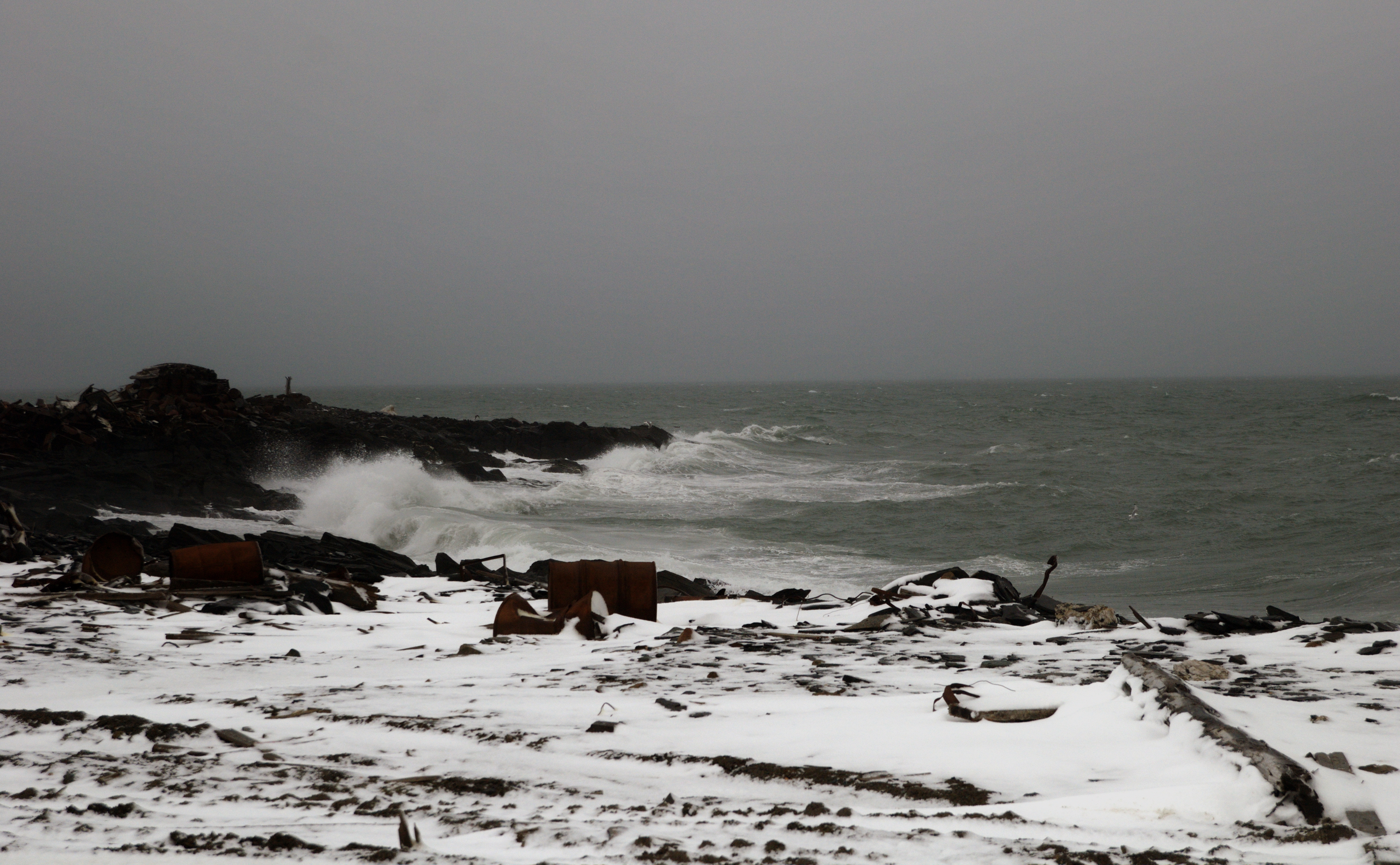 мыс Челюскина, Большой Арктический, Таймырский (Долгано-Ненецкий) район This image is related to the protected area of Russia number 2400170